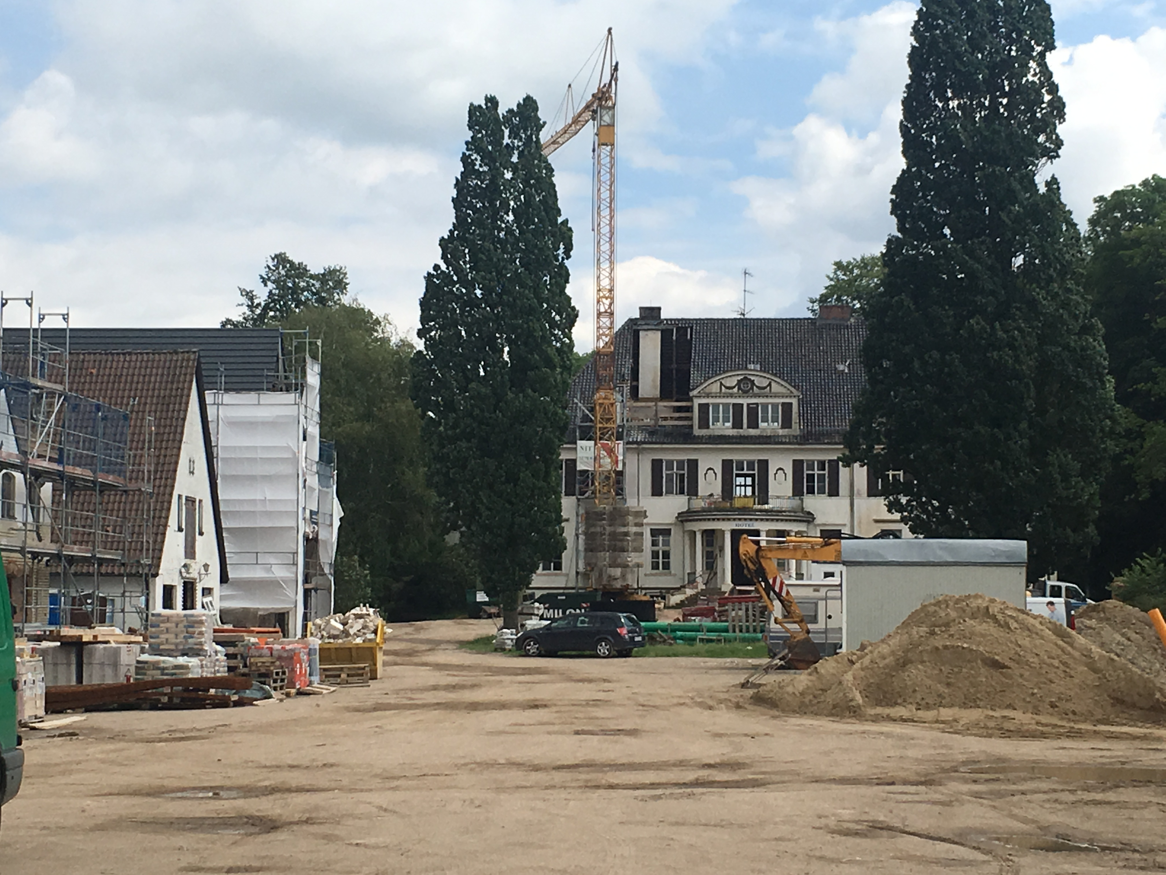 Aktueller Zustand des Immenhofs (Gut Rothensande) im Juli 2016